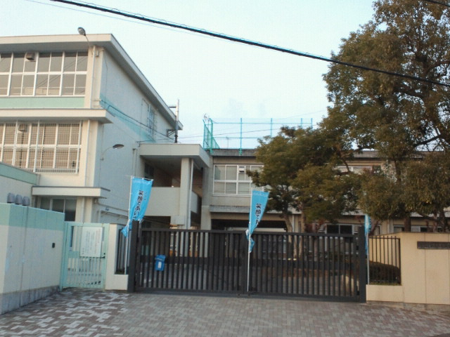 正門の前から